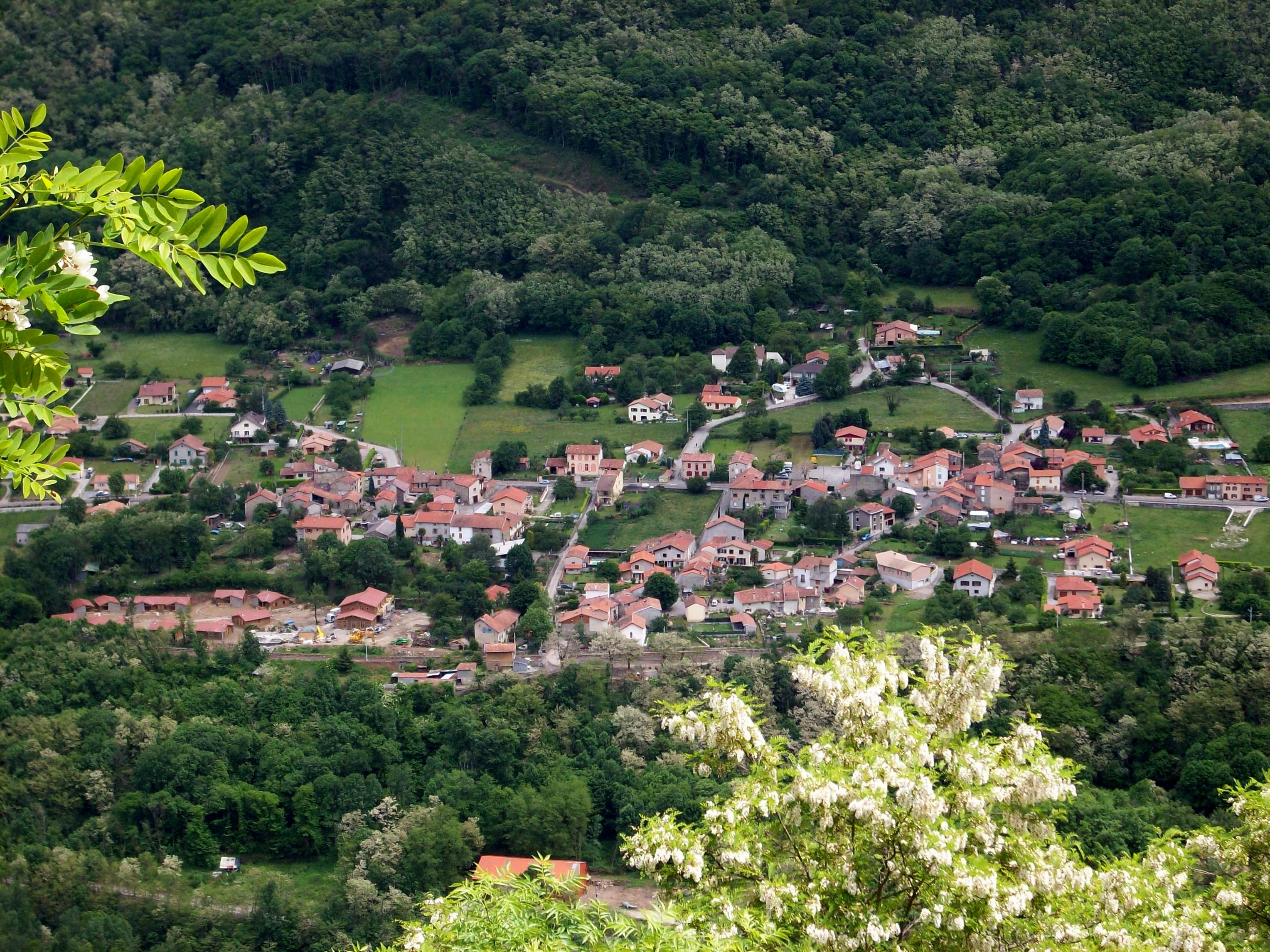 Vue de Garrabet depuis le belvédère de Seignaux